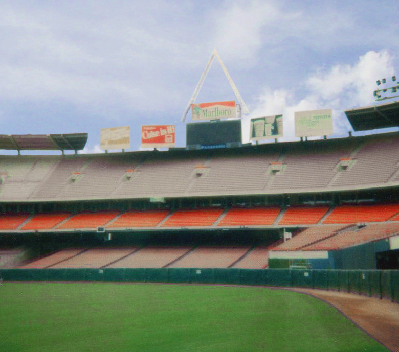 Anaheim, CA 1986